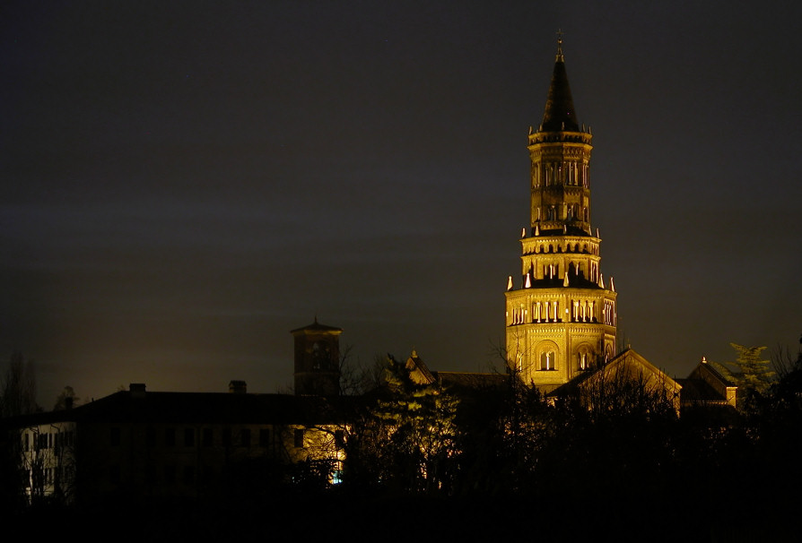 Abbazia di Chiaravalle (Milan) by night. Foto by Stefano Trezzi.